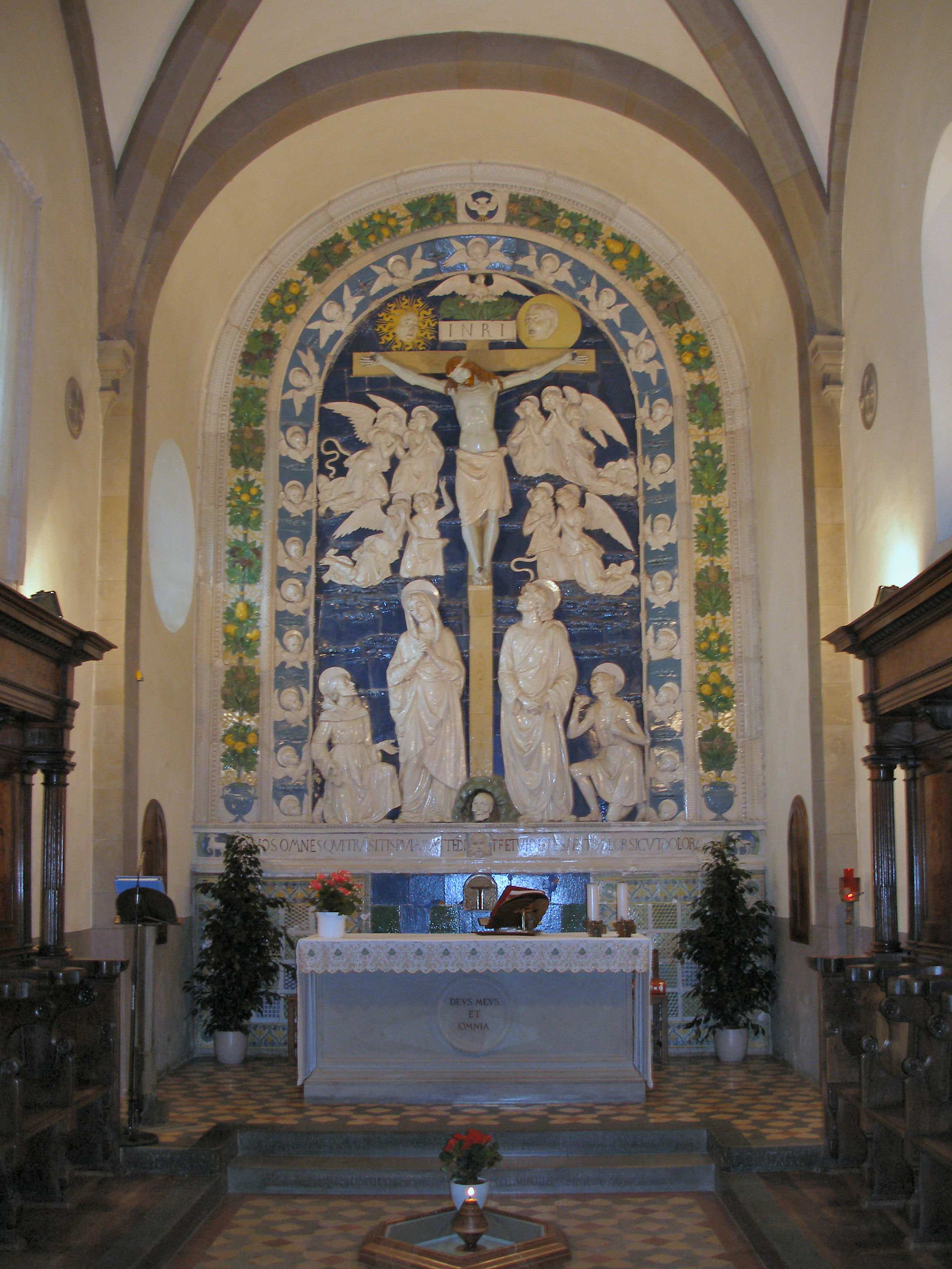 Andrea della Robbia, Crucifixion, La Verna.